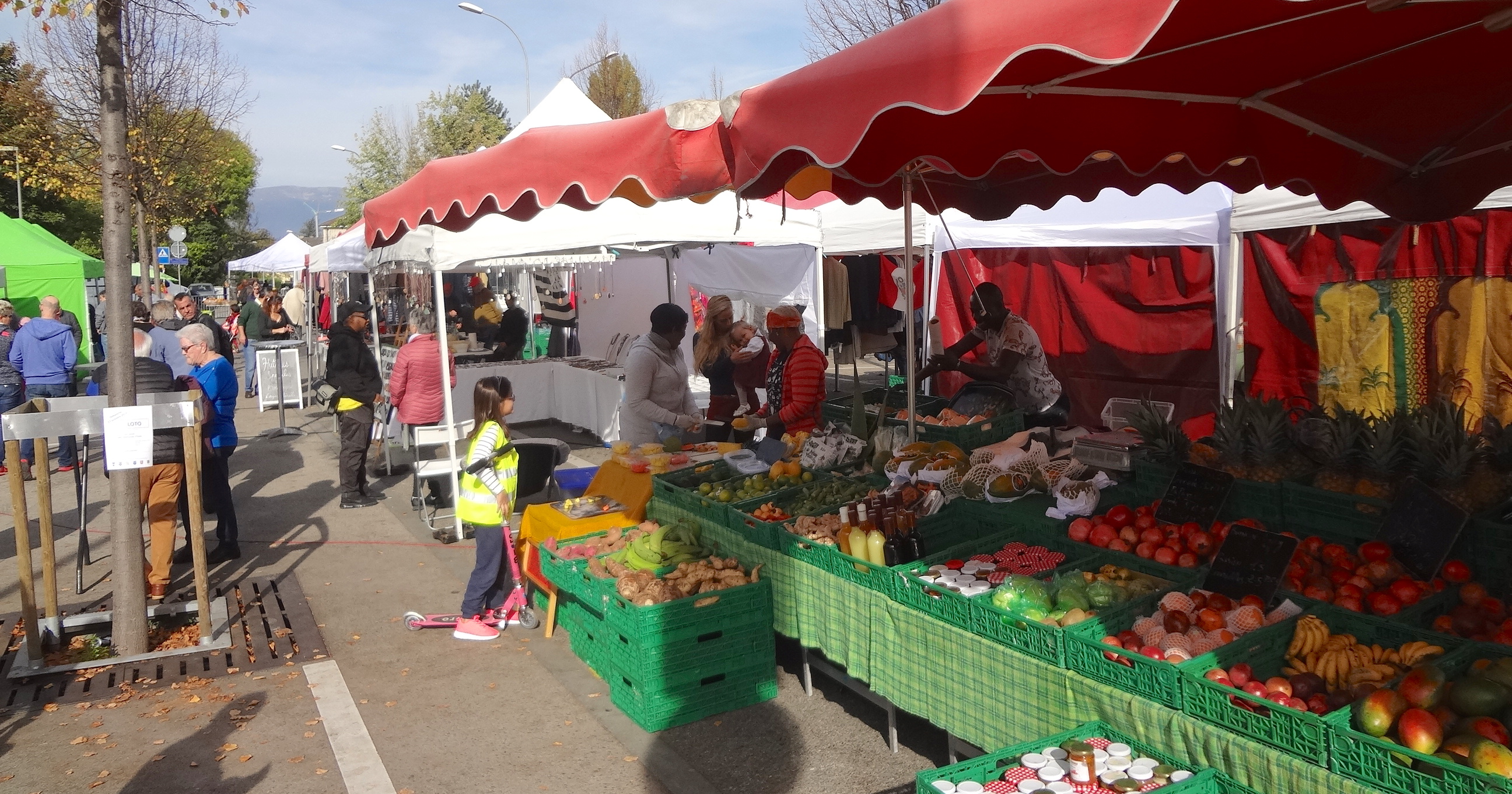 Marché du dimanche à Onex, Genève, Suisse : « Marchés du Monde ».